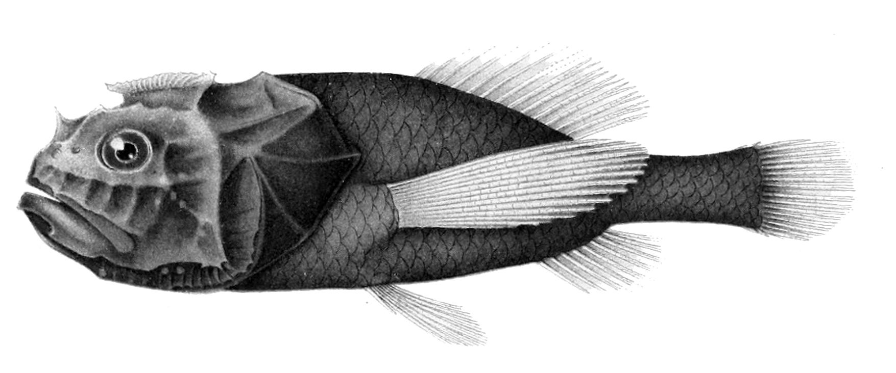 Poromitra unicornis